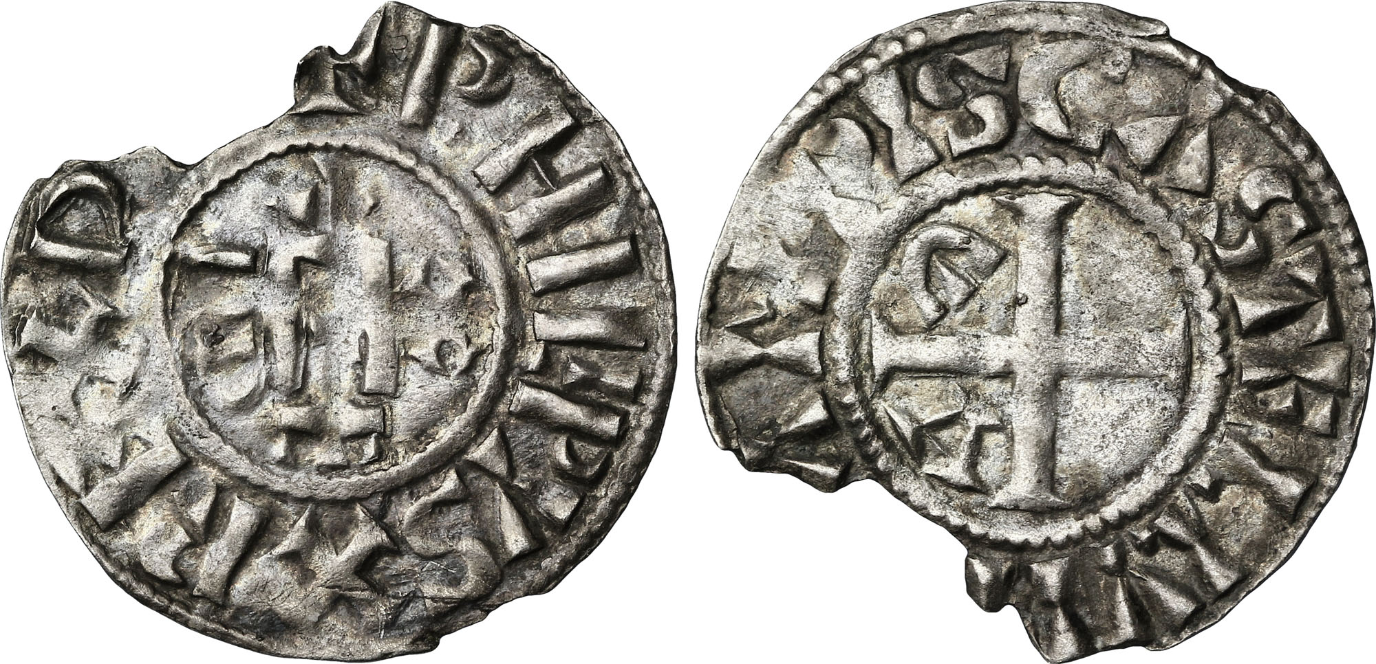 Nom de l'atelier : Étampes Métal : argent Diamètre : 21,5mm Axe des coins : 8h. Poids : 0,93g. Degré de rareté : R1 Titulature avers : + PHILIPVS X REX D-I. Description avers : Porte accostée de IN et IC, au milieu AT ; au-dessus un I. Traduction avers : (Philippe, roi par la grâce de Dieu). Titulature revers : CASTELLVM STAMPIS. Description revers : Croix cantonnée aux 1 et 3. Traduction revers : (Château d'Étampes).